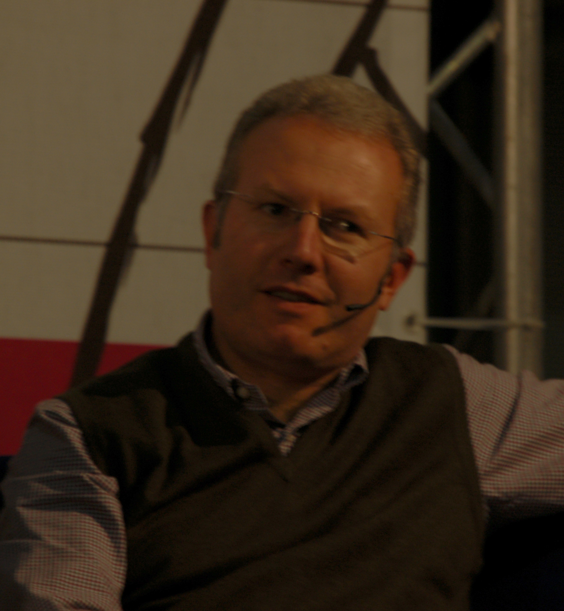 Xurxo Sierra Veloso no CulturGal 2010 no Pazo da Cultura de Pontevedra